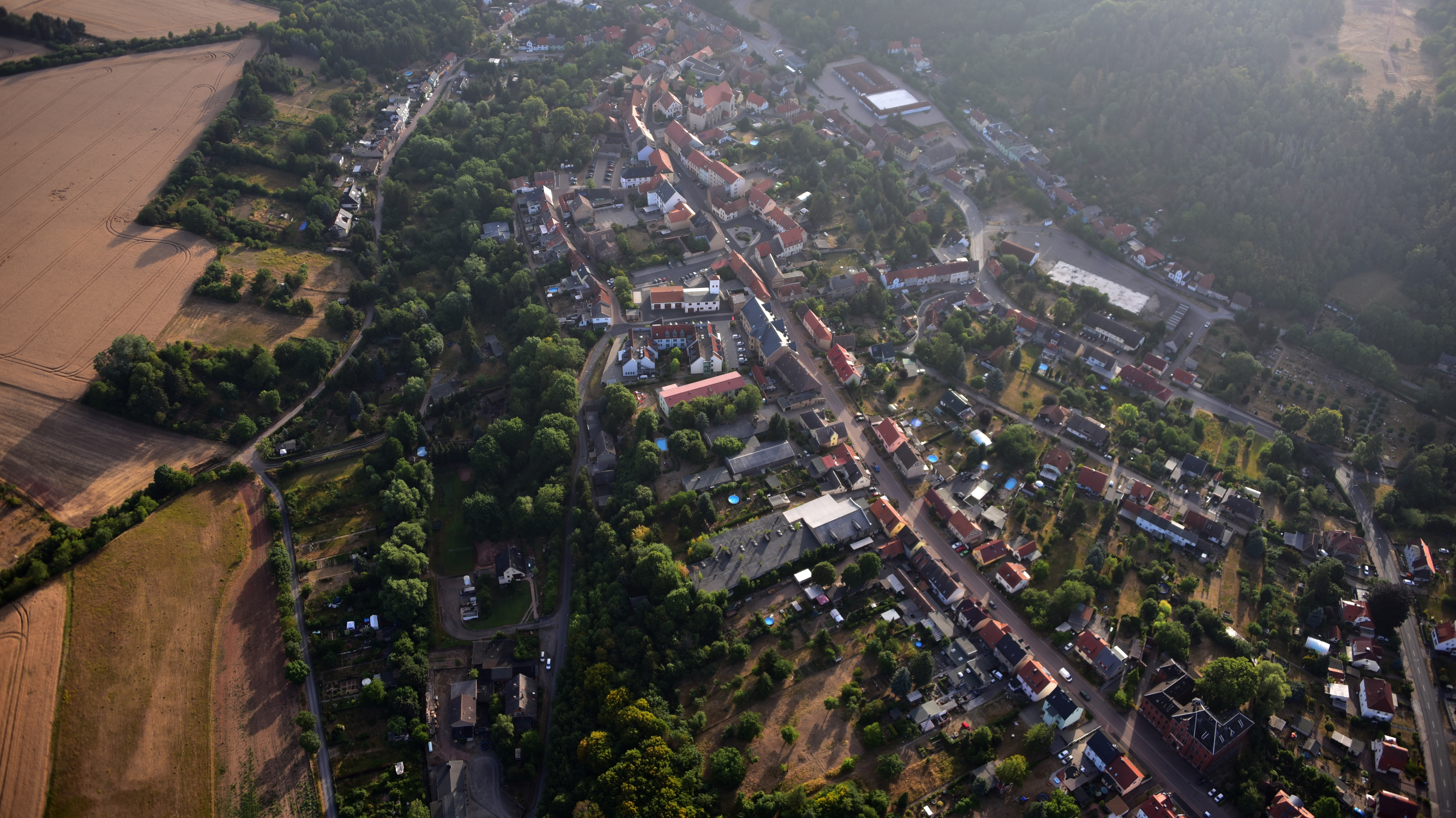 Mansfeld, Luftaufnahme (2018)